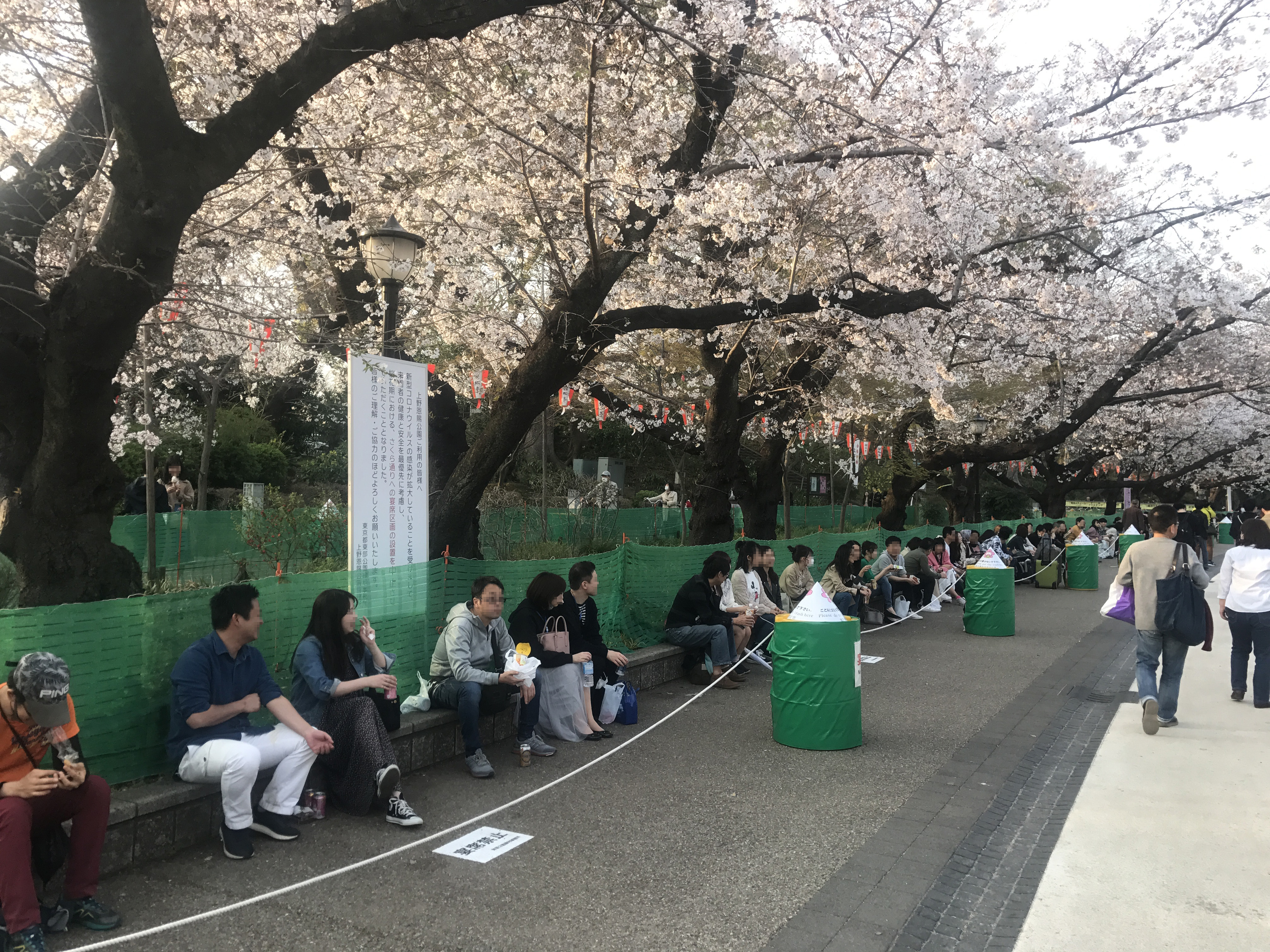 2020年の上野公園での花見の様子。新型コロナウイルス感染症の流行防止の観点から、さくら通りでの宴会の開催は禁止された。